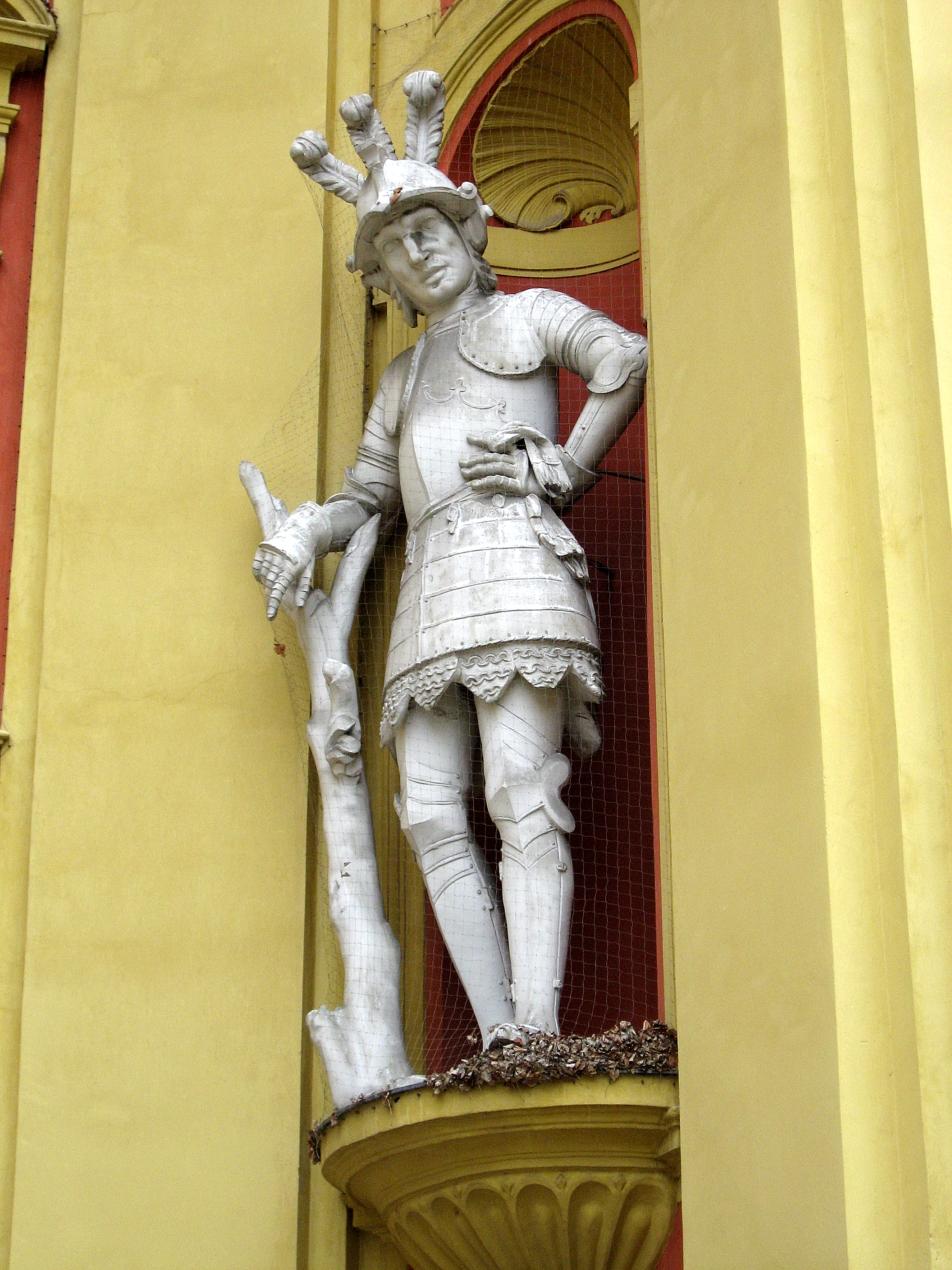 Österreich, Innsbruck, Stift Wilten, Figur des Riesen Thyrsus über dem Portal der Stiftskirche